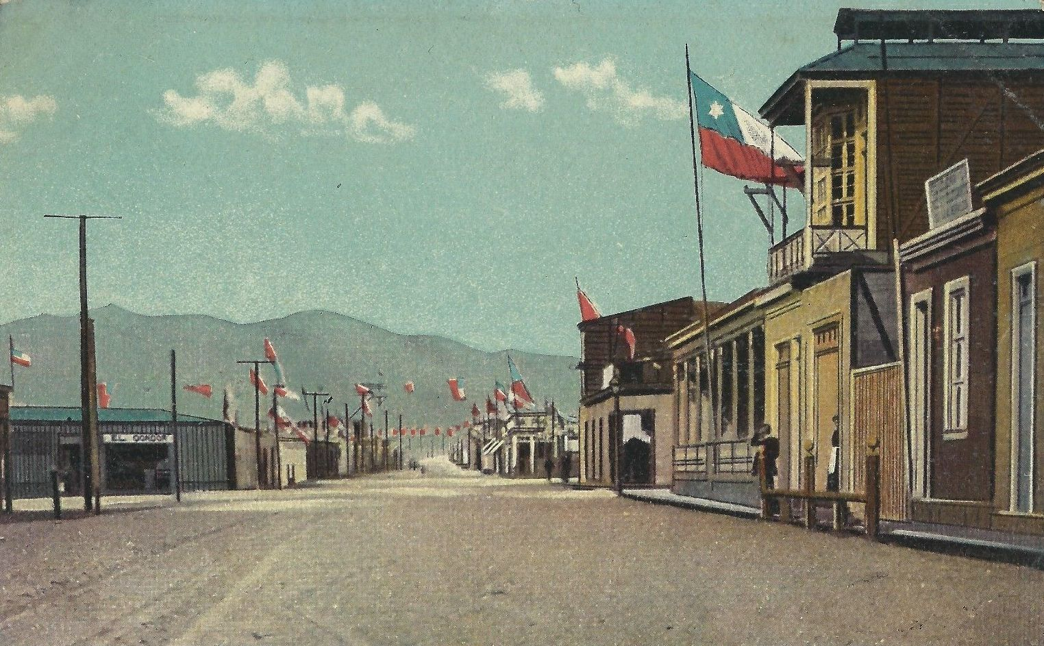 Mejillones. Mejillones es una comuna y ciudad del norte de Chile, situada a 65 kilómetros al norte de la ciudad de Antofagasta, en la provincia y región del mismo nombre.